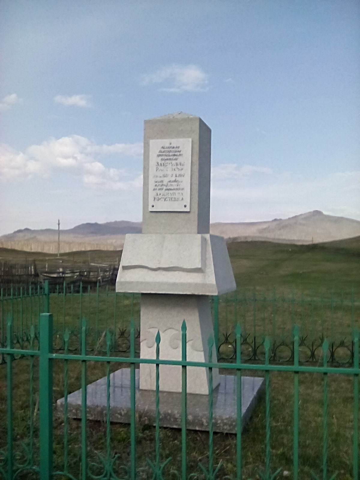 Республика Башкортостан, Учалинский район, д.Шарифово